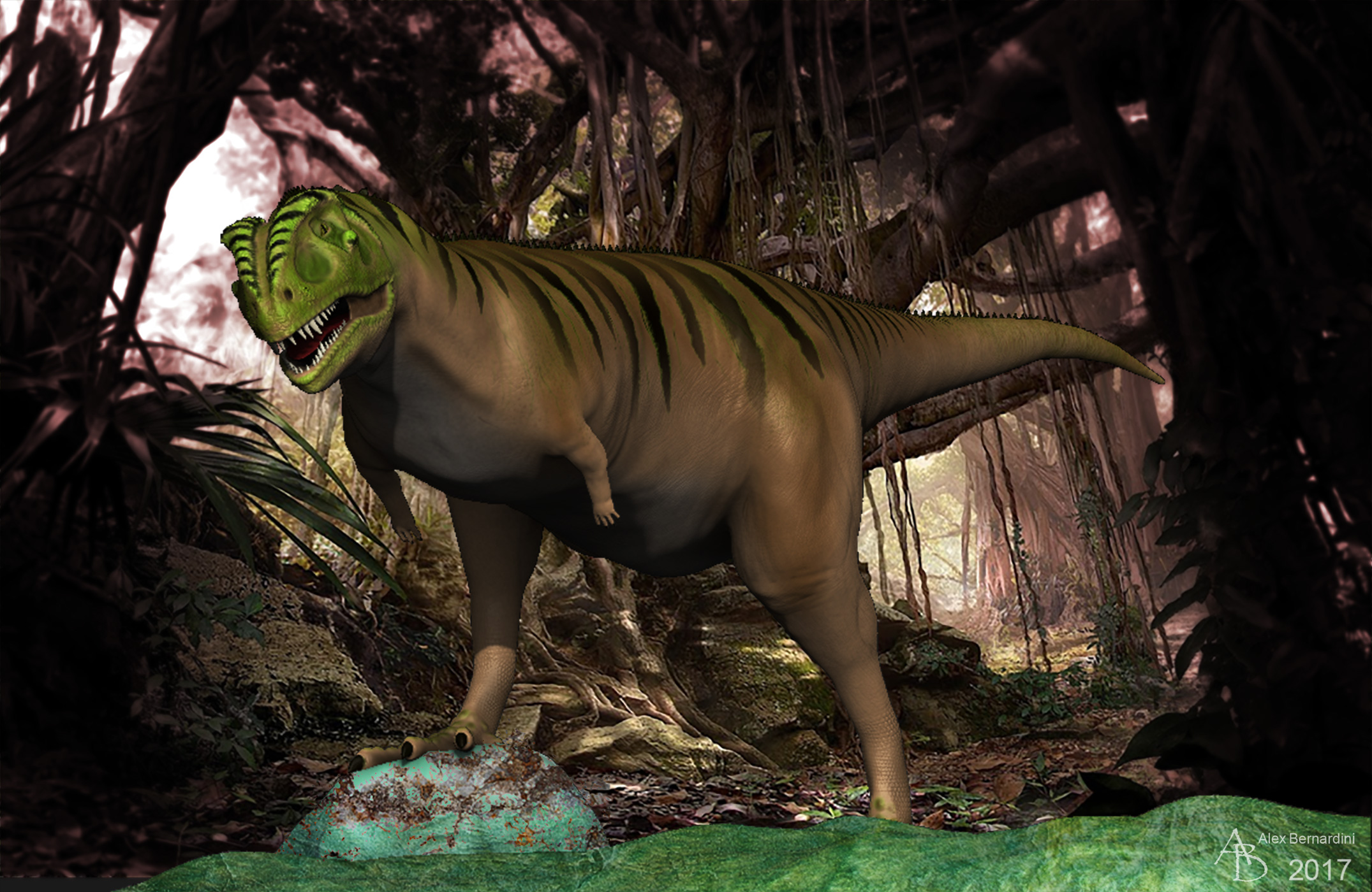 Reconstitution